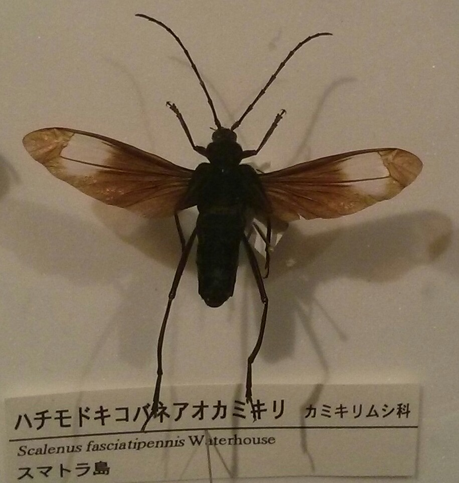 神奈川県立生命の星・地球博物館にあった標本です。